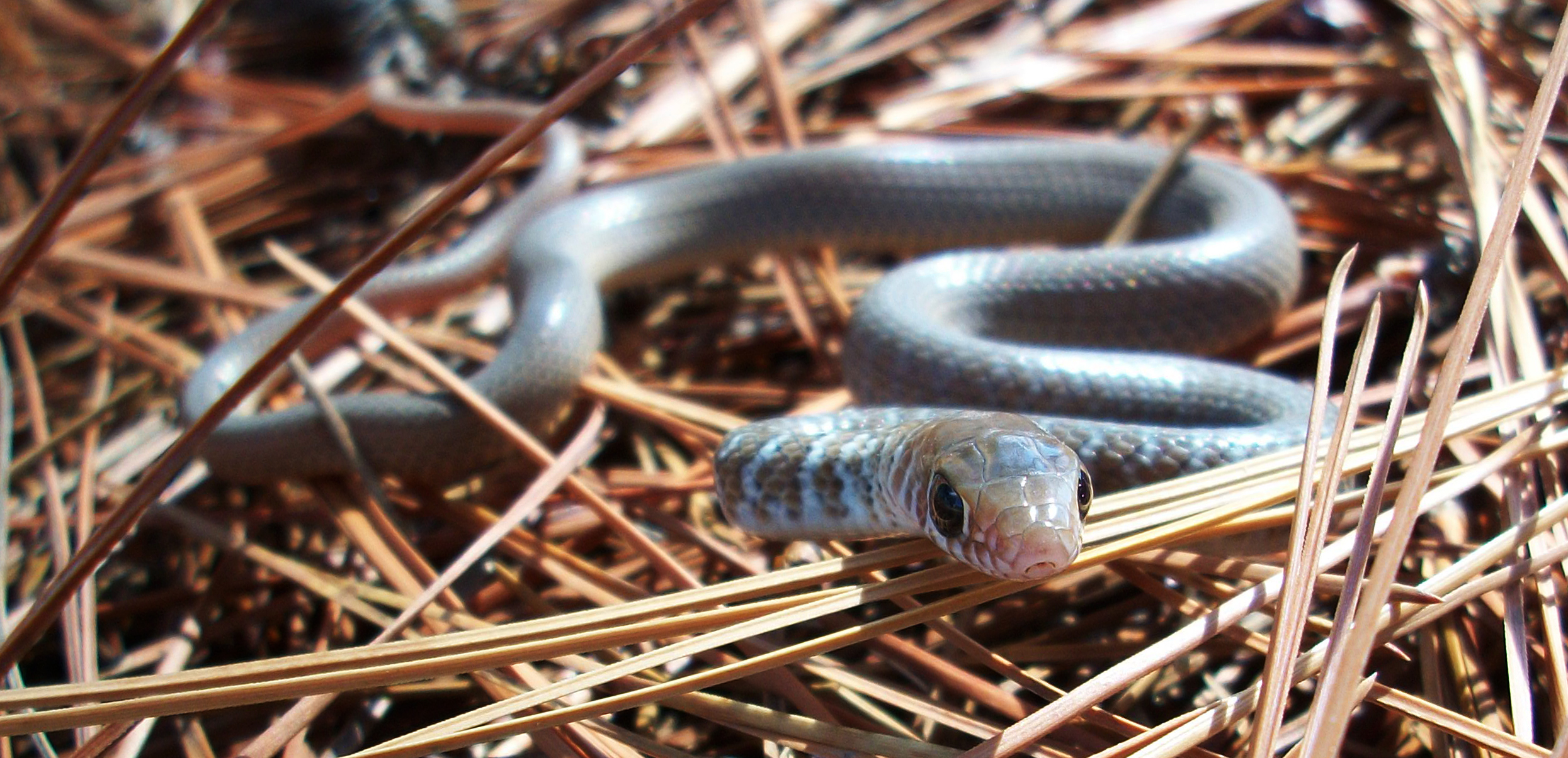 serpiente